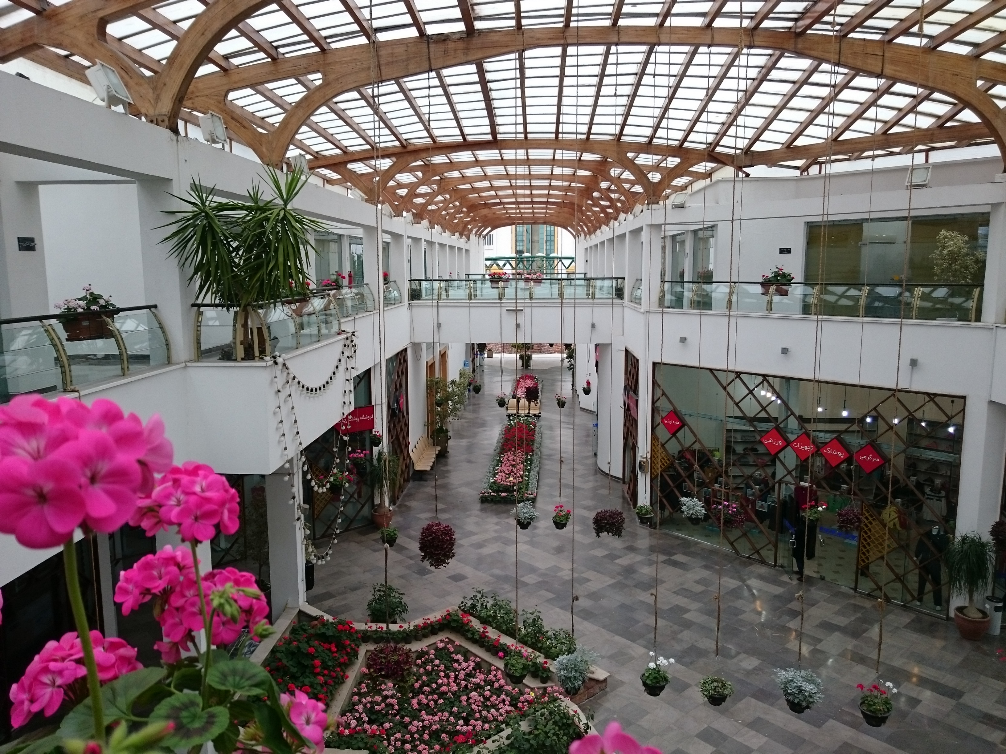 Bazar